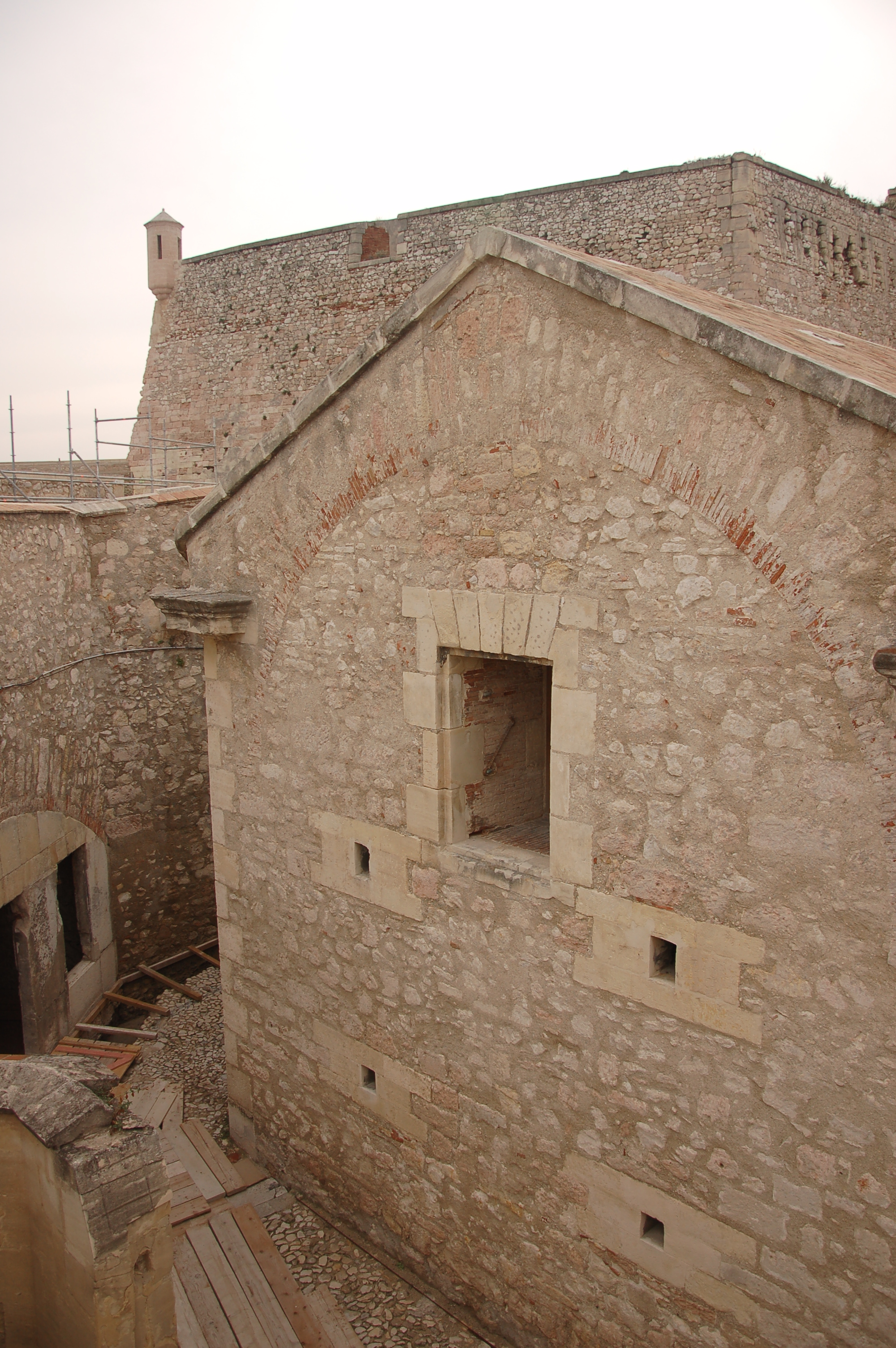 La poudrière est enclavée dans le Fort d’Entrecasteaux, partie haute du Fort Saint Nicolas à Marseille. Construite au XIXème siècle, elle rapprochait les munitions du Haut-Fort tout en réduisant les dangers d'explosion grâce à des cylindres remplis d'air présents dans la poudrière. Ces cylindres permetter l'implosion de la poudrière en cas d'attaque, ce qui préservait le Haut-Fort voisin (explications recueillies auprès de l'asssociation ActaVista en charge de la restauration des lieux lors des journées du patrimoine 2014)